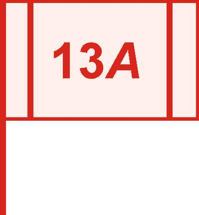 Іконка - прапор 13-ї загальновійськової армії ЗС СРСР